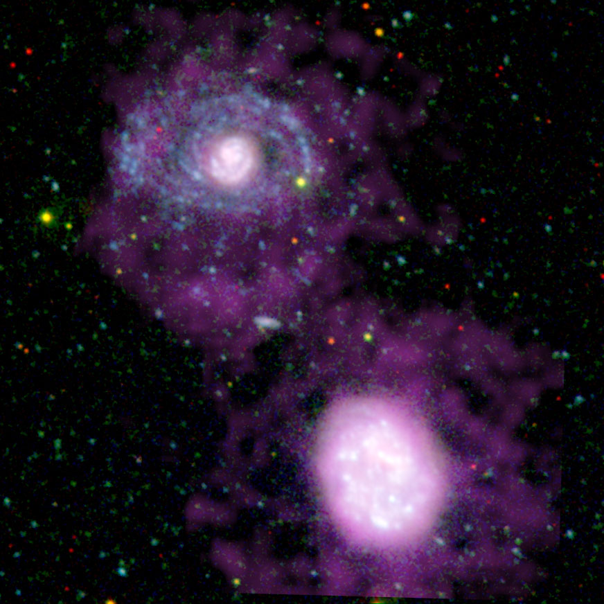 NGC 4625 in ultraviolete light